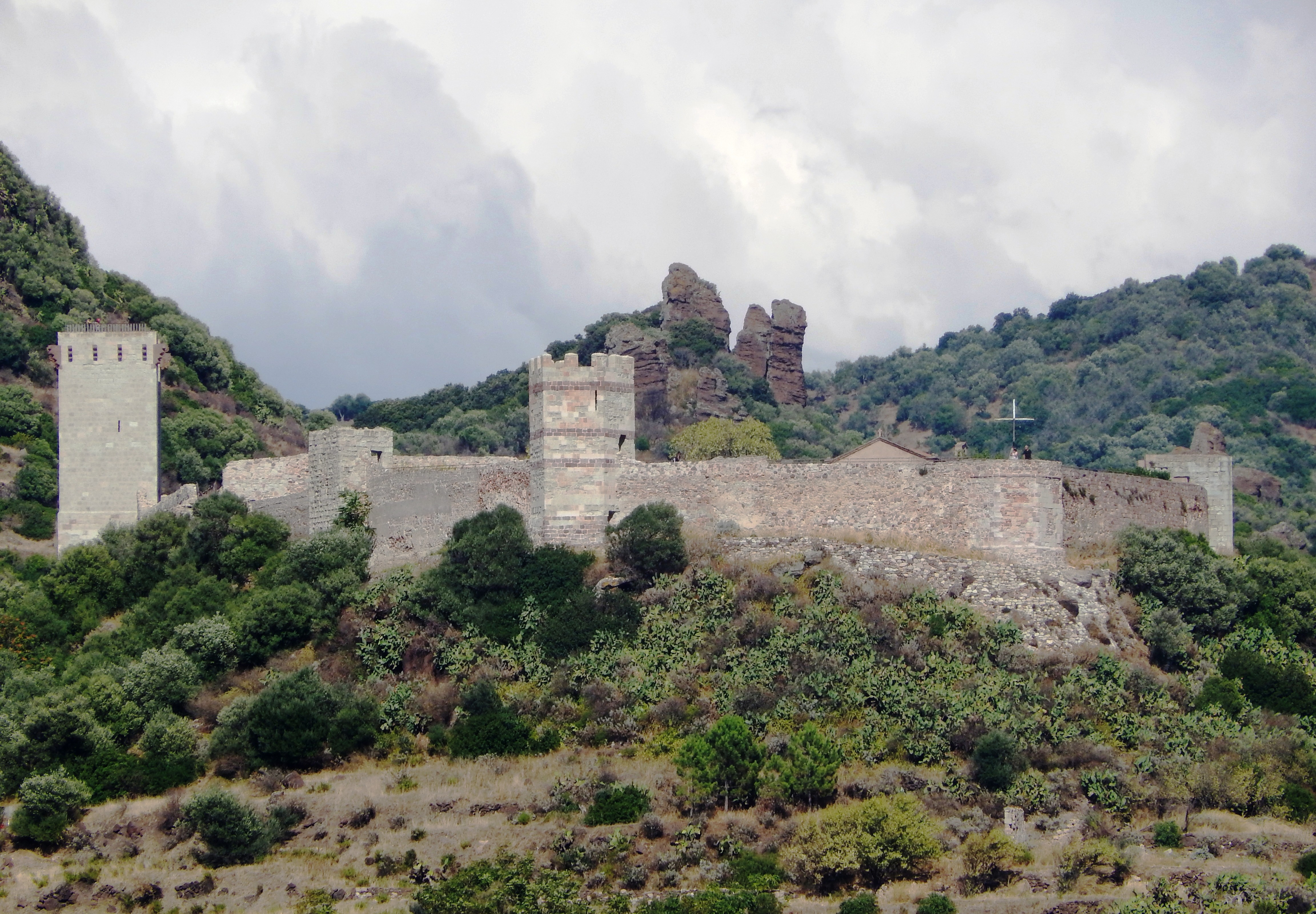 Il Castello Malaspina, immerso nella macchia mediterranea, che domina la città di Bosa. This is a photo of a monument which is part of cultural heritage of Italy.